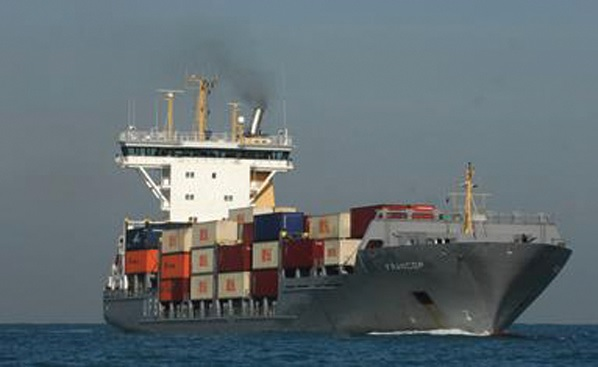 האניה פרנקופ שנתפשה בים התיכון נושאת אמצעי לחימה עבור רצועת עזה